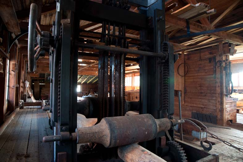 Nor 4:2. Ramsåg. Sågbyggnaden med tillhörande maskinhus byggdes under åren 1897-98 och var igång till 1956. Sågen är representativ för ett tidigare stort sågverksbestånd där bland annat timmer till Hälsingegårdar sågades. Motiv: Nor 4:2 Nyckelord: Byggnadsminnen, Riksintressen Kategori: Sågverk Nor 4:2. Ramsåg. Sågbyggnaden med tillhörande maskinhus byggdes under åren 1897-98 och var igång till 1956. Sågen är representativ för ett tidigare stort sågverksbestånd där bland annat timmer till Hälsingegårdar sågades. Nor 4:2.